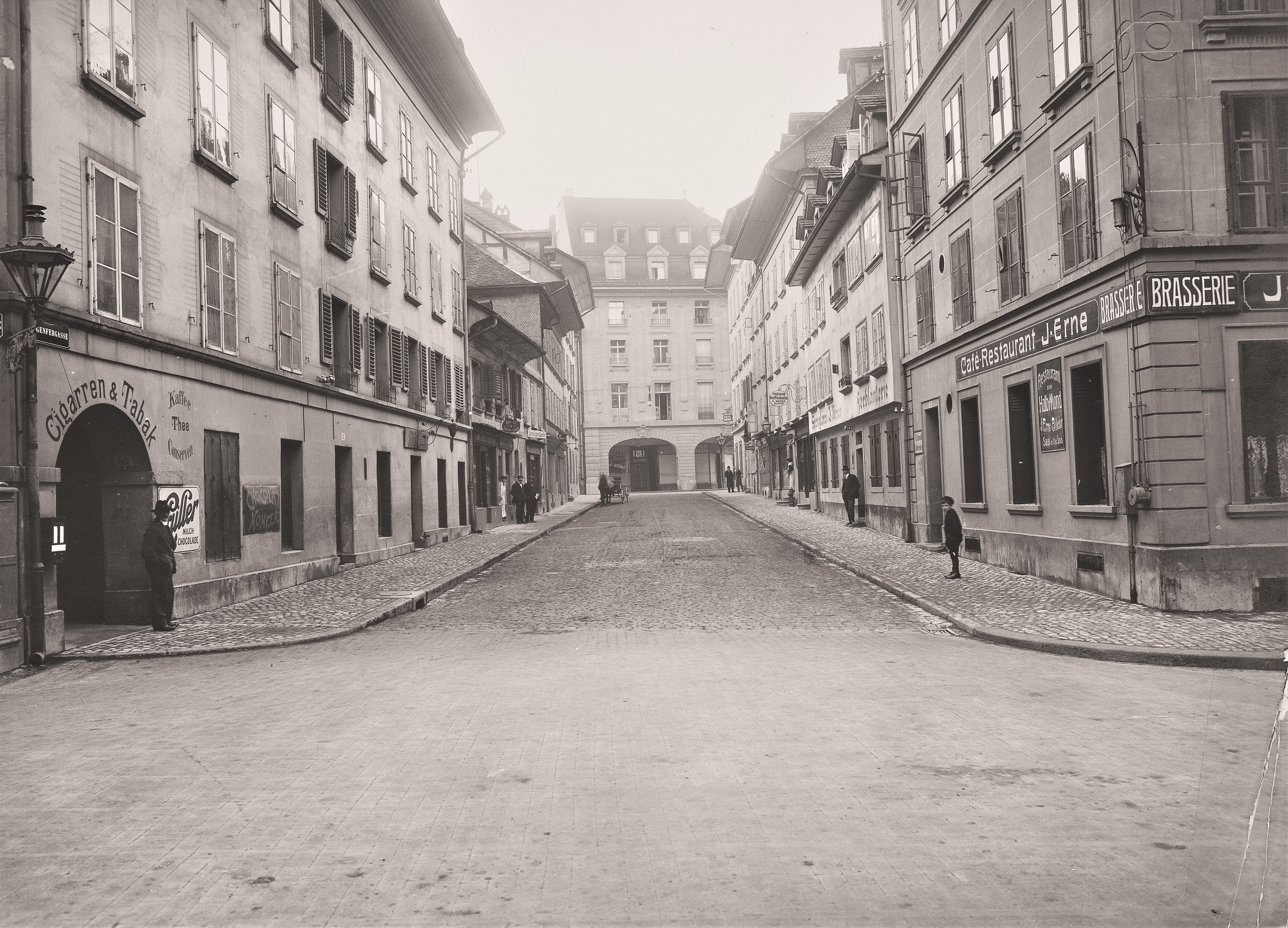 Genfergasse vor der Asphaltierung (1917)